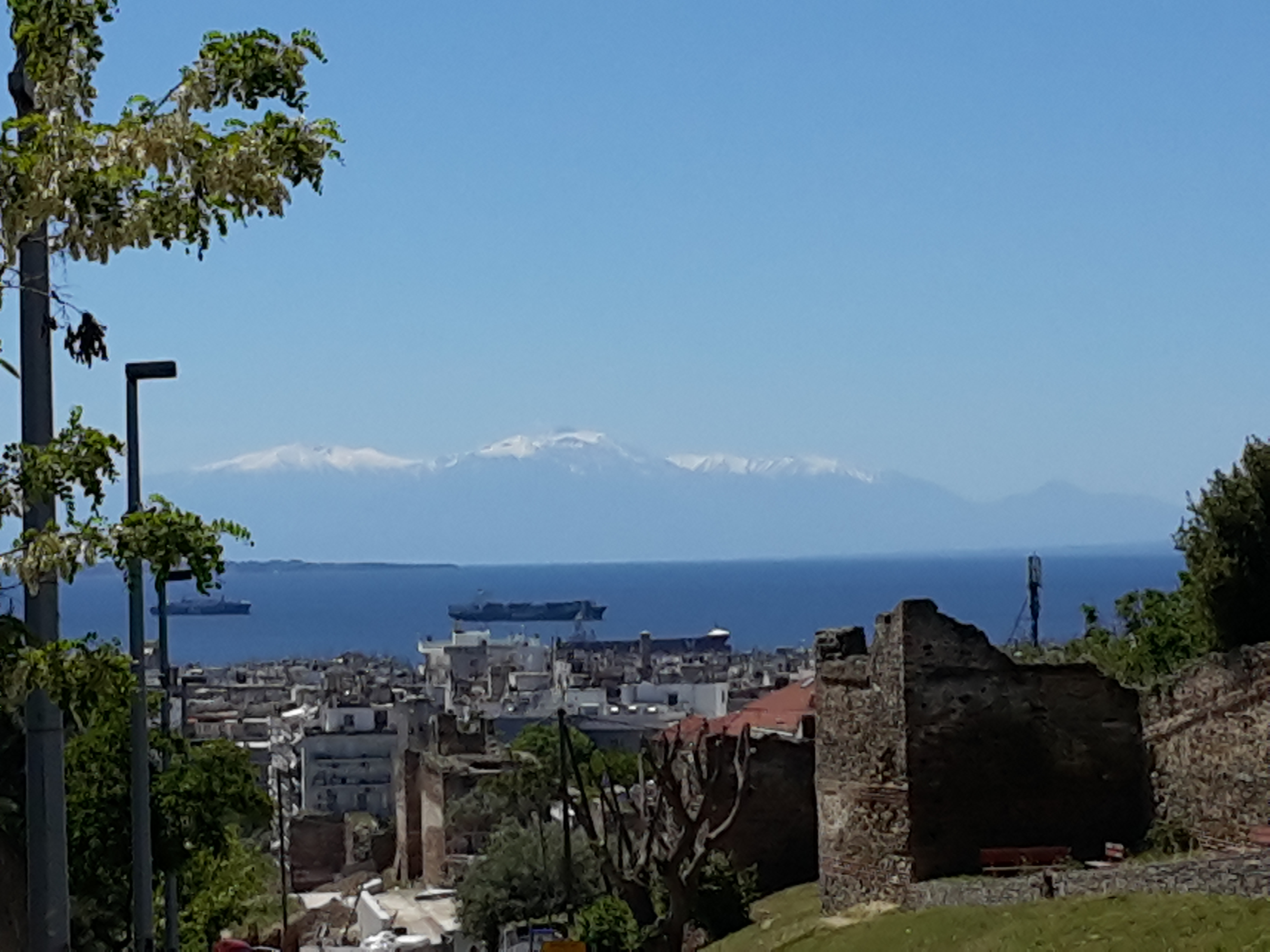 Θέα από τον Άγιο Παύλο